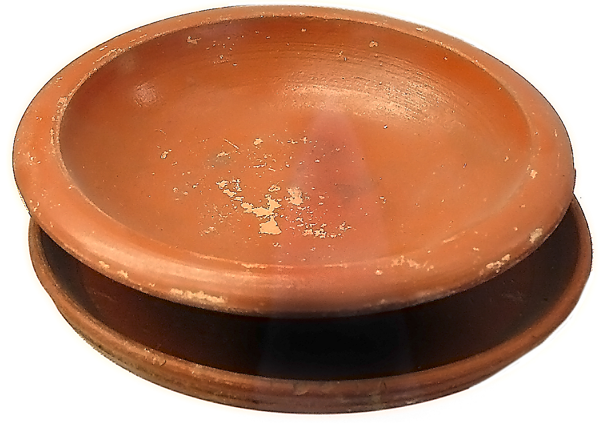 Cerámica romana, plato con barniz rojizo muy similar al que usaban los legionarios romanos en campaña (provincia de Valladolid, España)